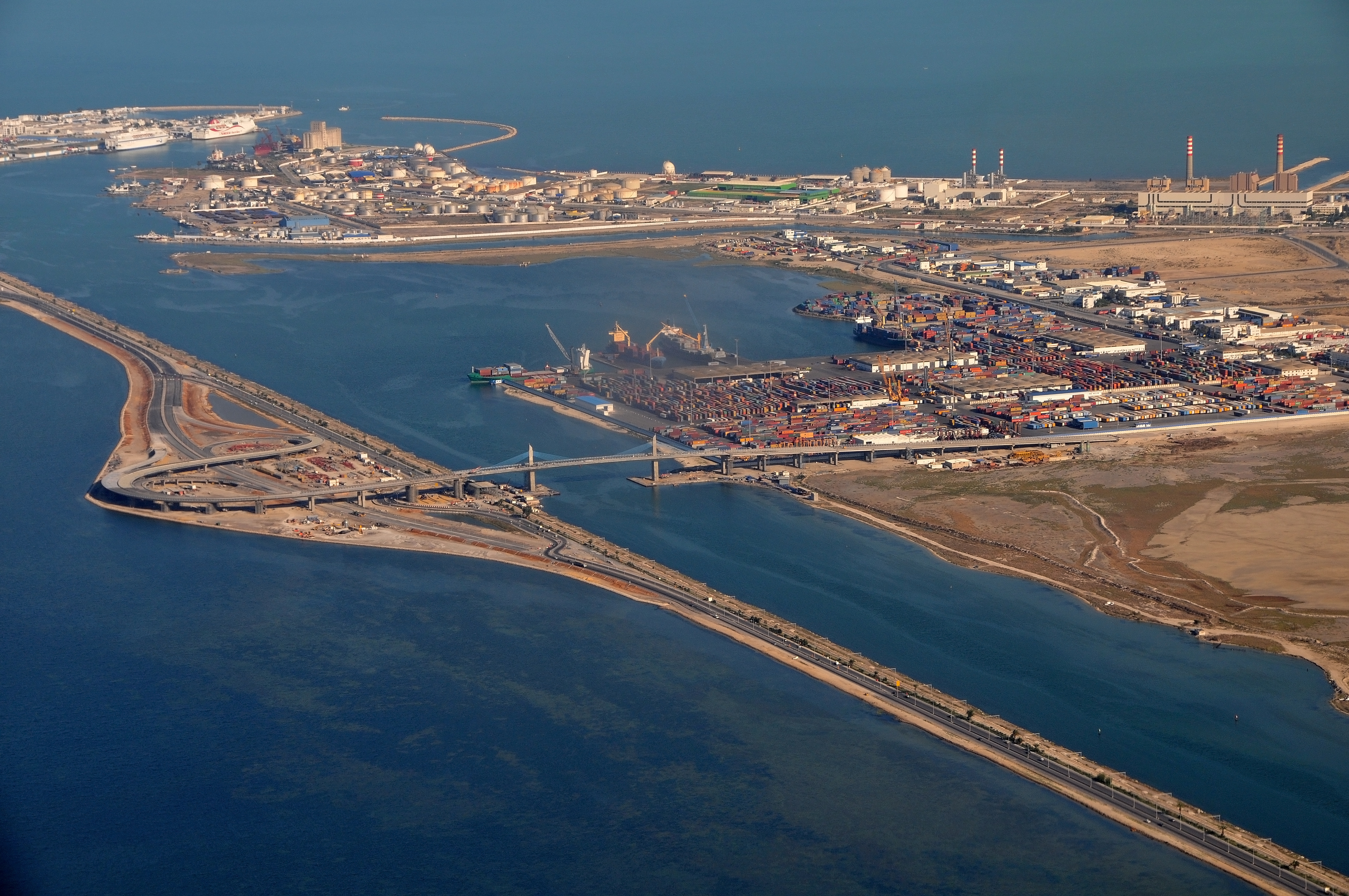 Vue aérienne du port de Radès au nord-est de Tunis. On apperçoit aussi le nouveau pont qui enjambe le lac de Tunis.